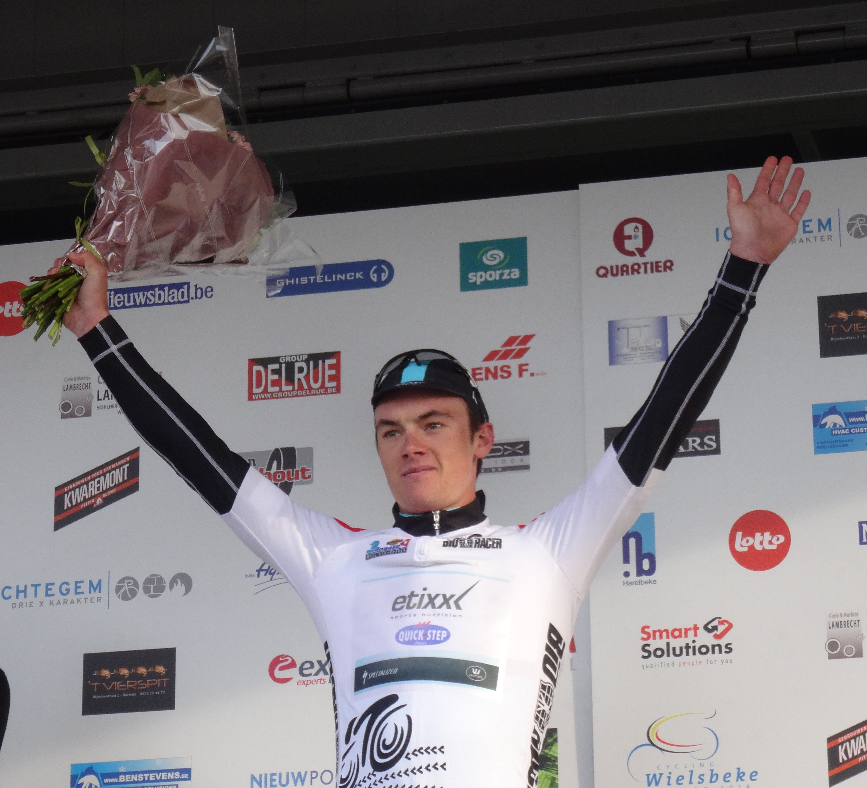 Reportage réalisé le samedi 7 mars à l'occasion de l'arrivée de la première étape des Trois jours de Flandre-Occidentale 2015 à Harelbeke, Belgique.